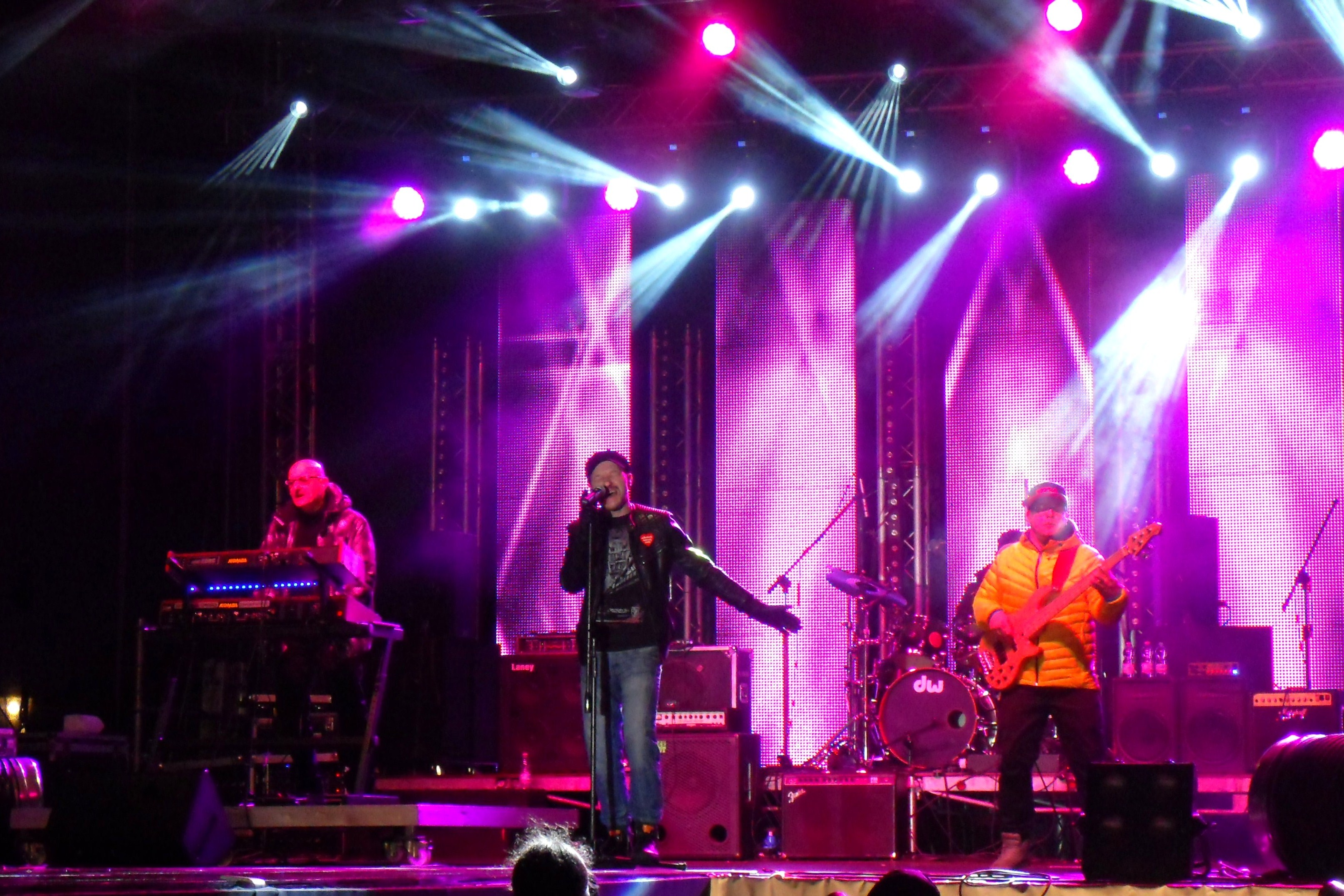 "Kombi" (Łosowski) w Gdańsku, od lewej: Sławomir Łosowski (klawisze), Zbigniew Fil (wokal) i Karol Kozłowski (gitara).